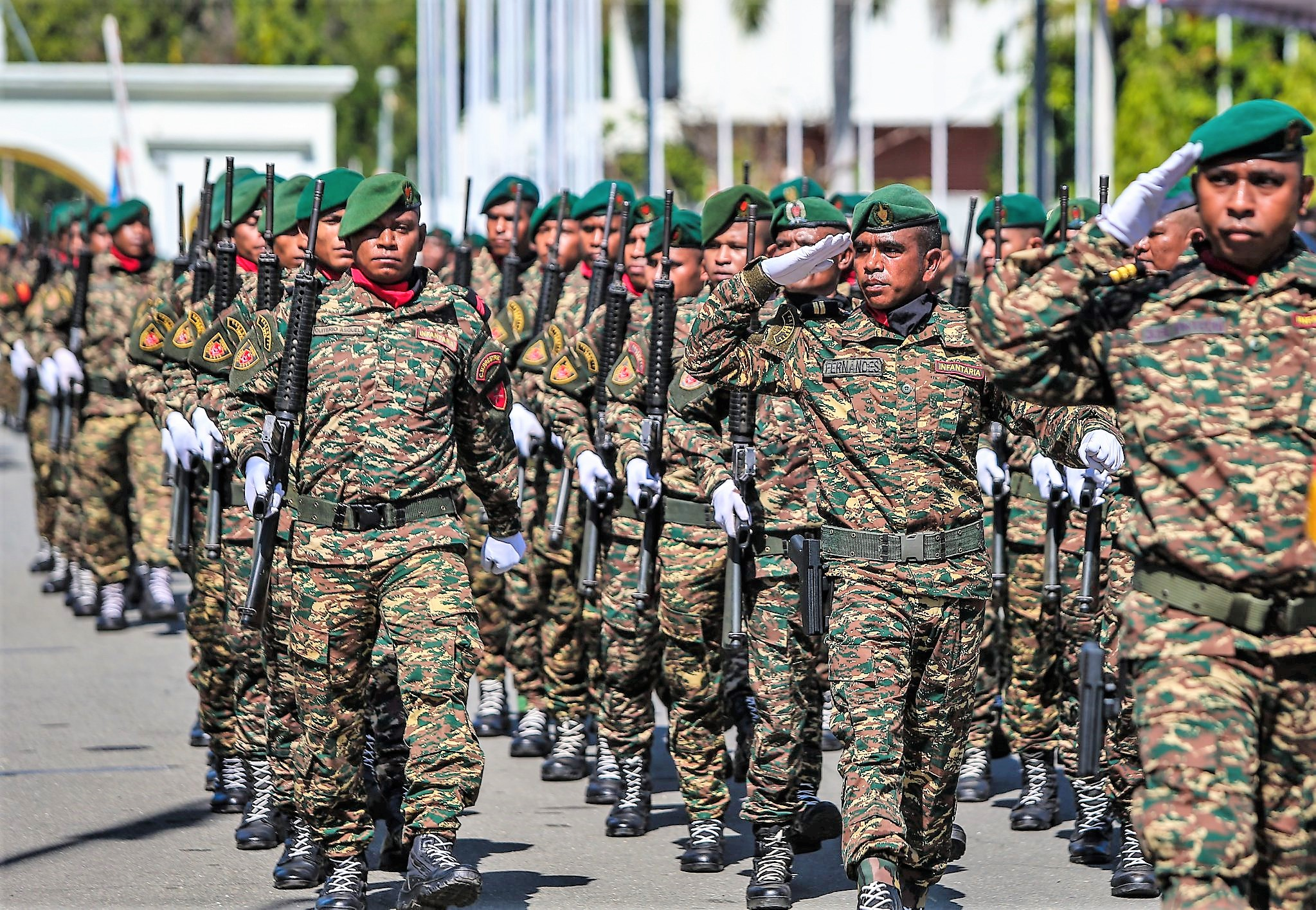 F-FDTL Infanteria Componente Terrestre